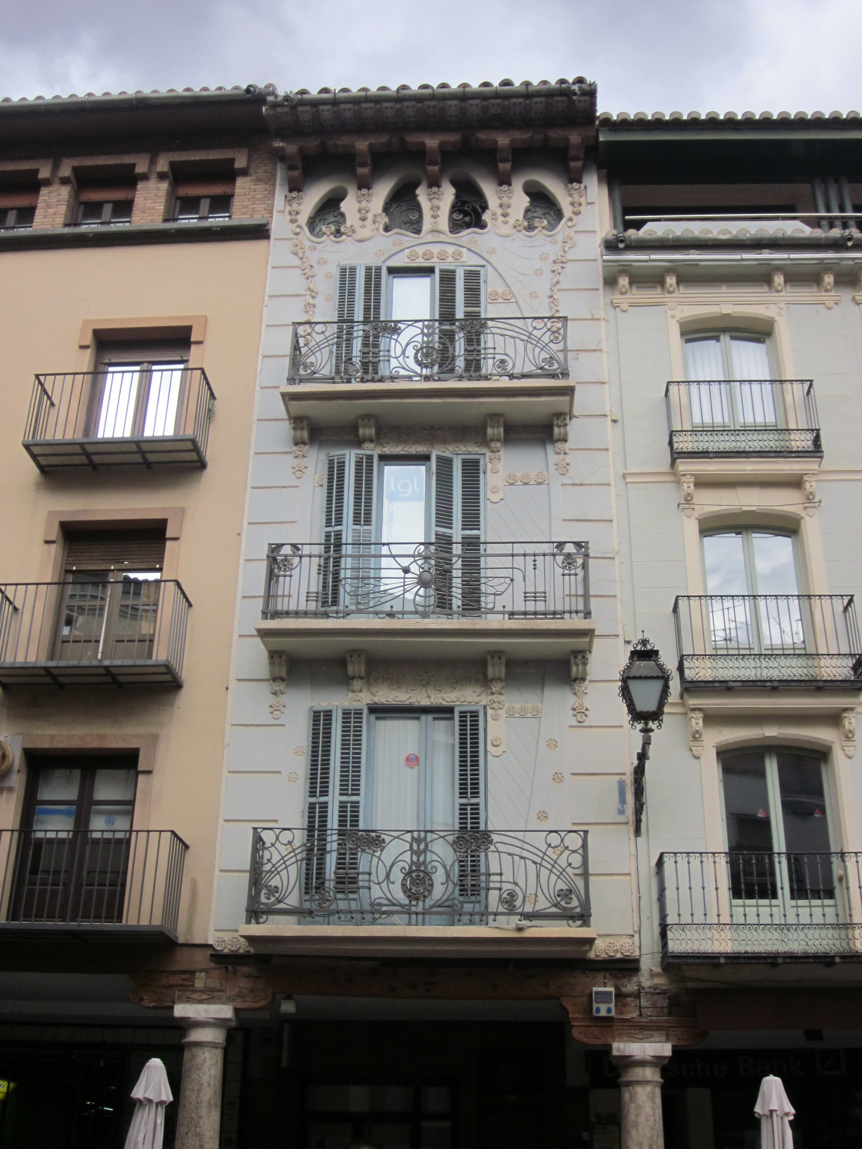 Casa La Madrileña, Teruel, Aragón, España.